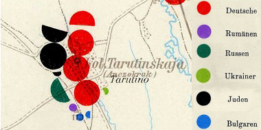 Landkarte mit ethnischen Gruppen in Tarutino nach der rumänischen Volkszählung von 1930, hier 500 Russen, 3500 Deutsche, 1550 Juden, 100 Rumänen, 150 Bulgaren